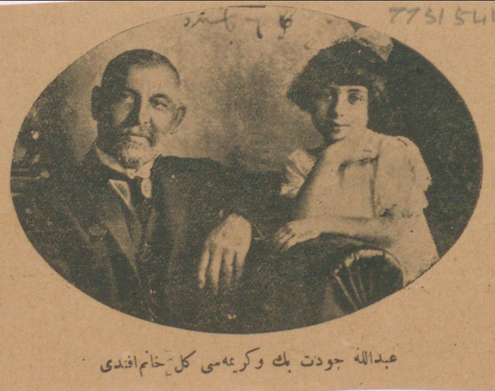 Abdullah Cevdet ve kerimesi Gül Hanımefendi This work first published in the Ottoman Empire is now in the public domain because the Empire's copyright formalities were not met (copyright notice, registration, and deposit), or because the copyright term (30 years after the death of the author, sometimes less) expired before the Empire was dissolved (details).